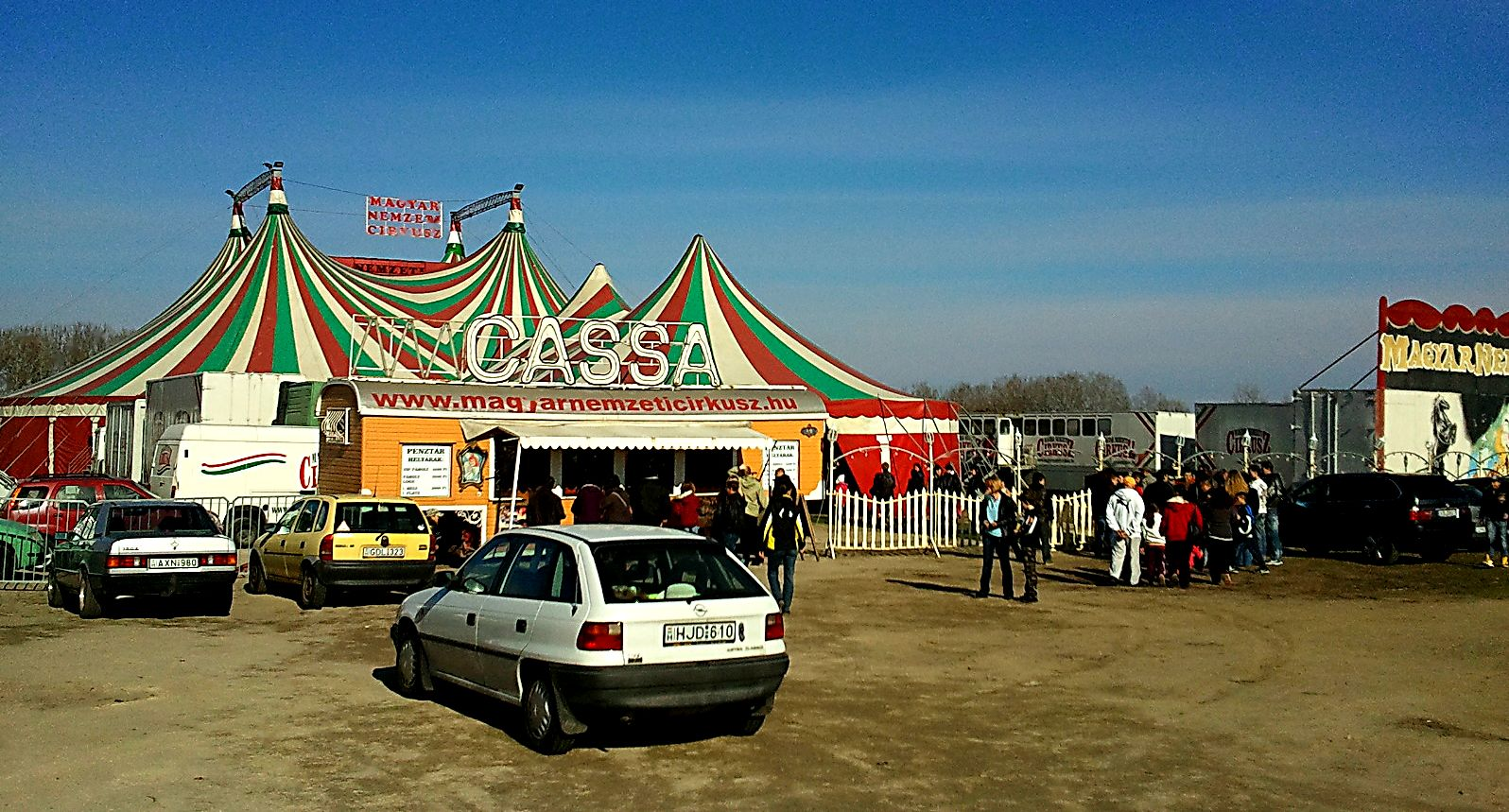 Magyar Nemzeti Cirkusz. Budapest, Rákospalota.